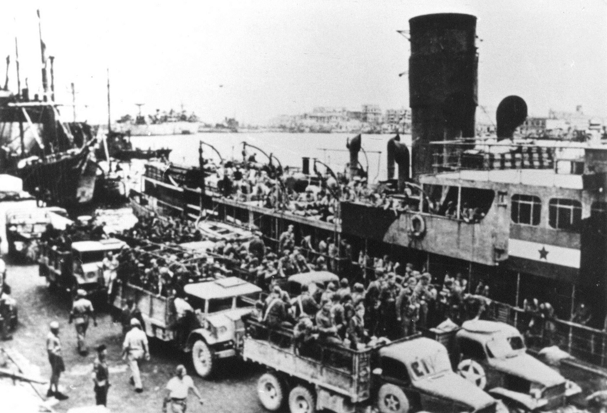 Borci 3. prekomorske brigade se vkrcujejo na ladjo Ljubljana v Bariju.